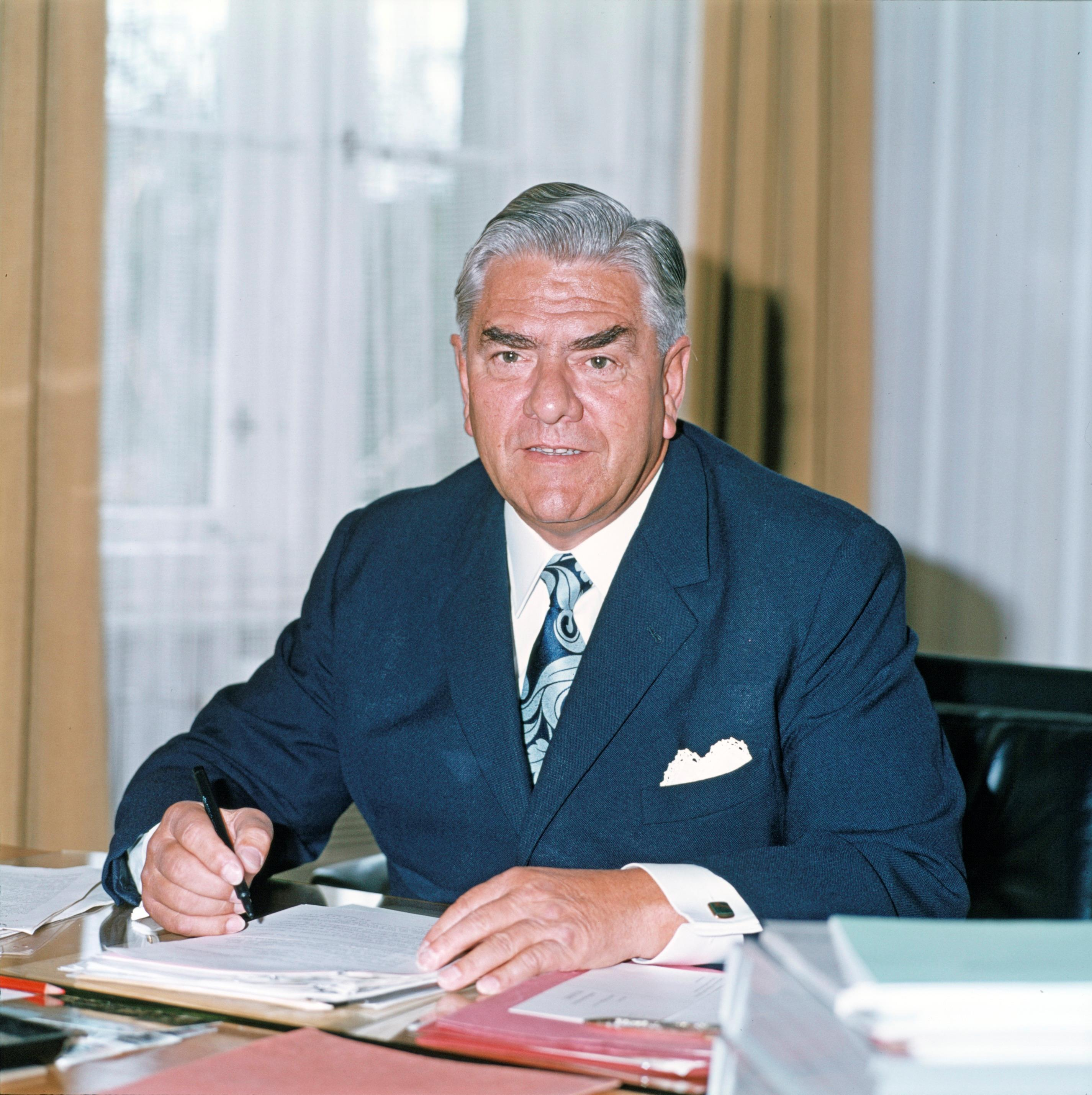 Martin Müller war von 1964 bis 1974 Mitglied der Vorarlberger Landesregierung und in dieser Zeit von 1973 bis 1974 Landesstatthalter von Vorarlberg. Hier auf einer offiziellen Portraitaufnahme vom September 1973.